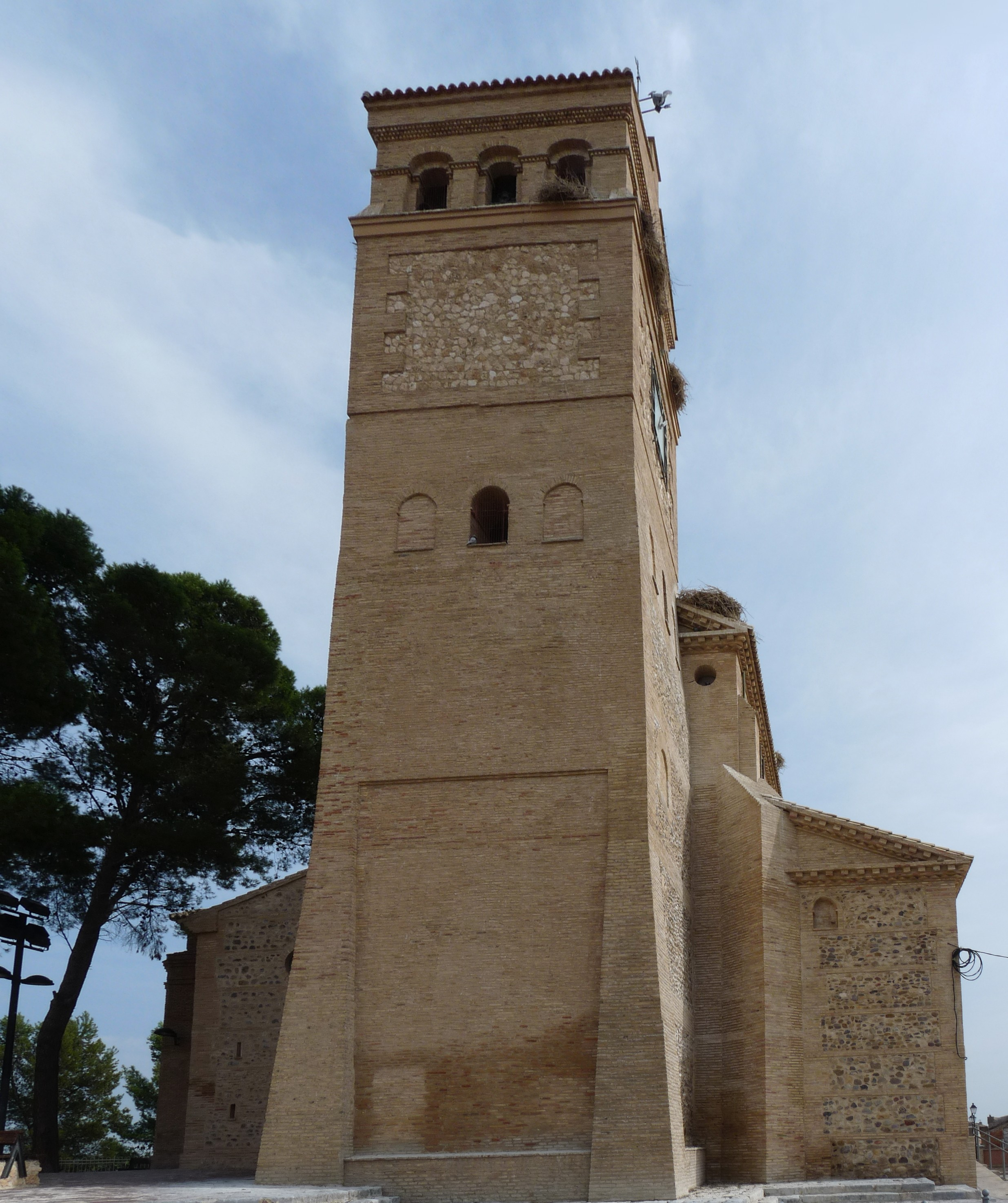 Gallur - Iglesia de San Pedro (s. XVIII) - Torre (s. XX)